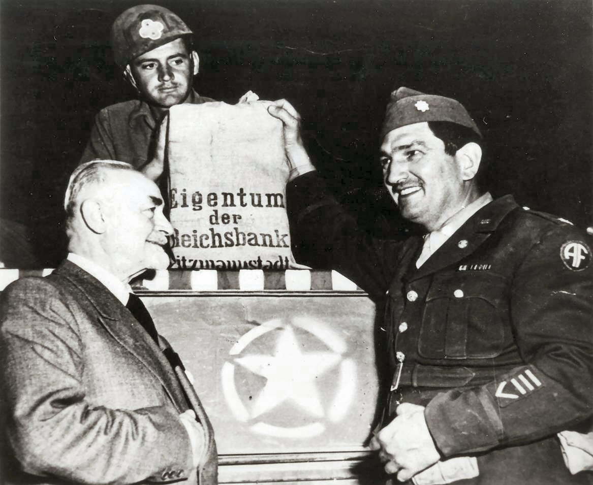 Rientro di parte dell'oro trafugato dai tedeschi a Roma